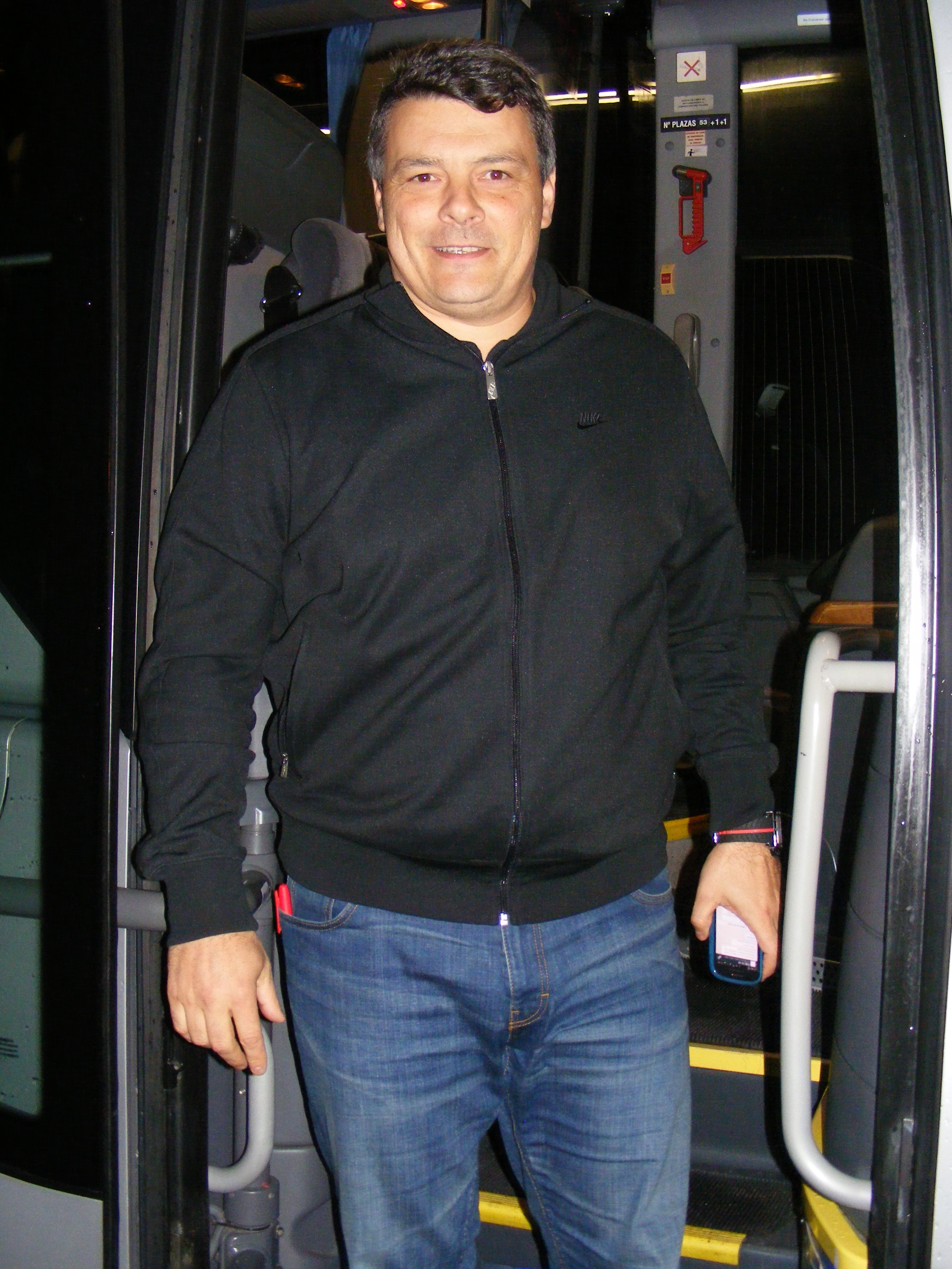 Xavier Pascual entrenador de balonmano español.